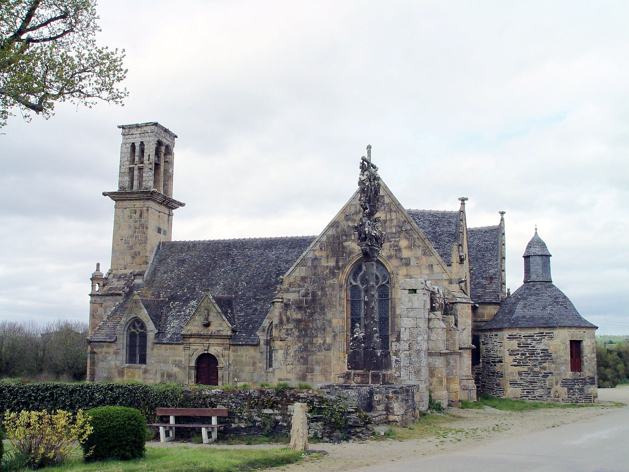 Saint-Segal (Bretagne, Finistere): Kapelle Saint Sebastien. Erbaut im 15. Jahrhundert zur Abwendung einer Pestepidemie.